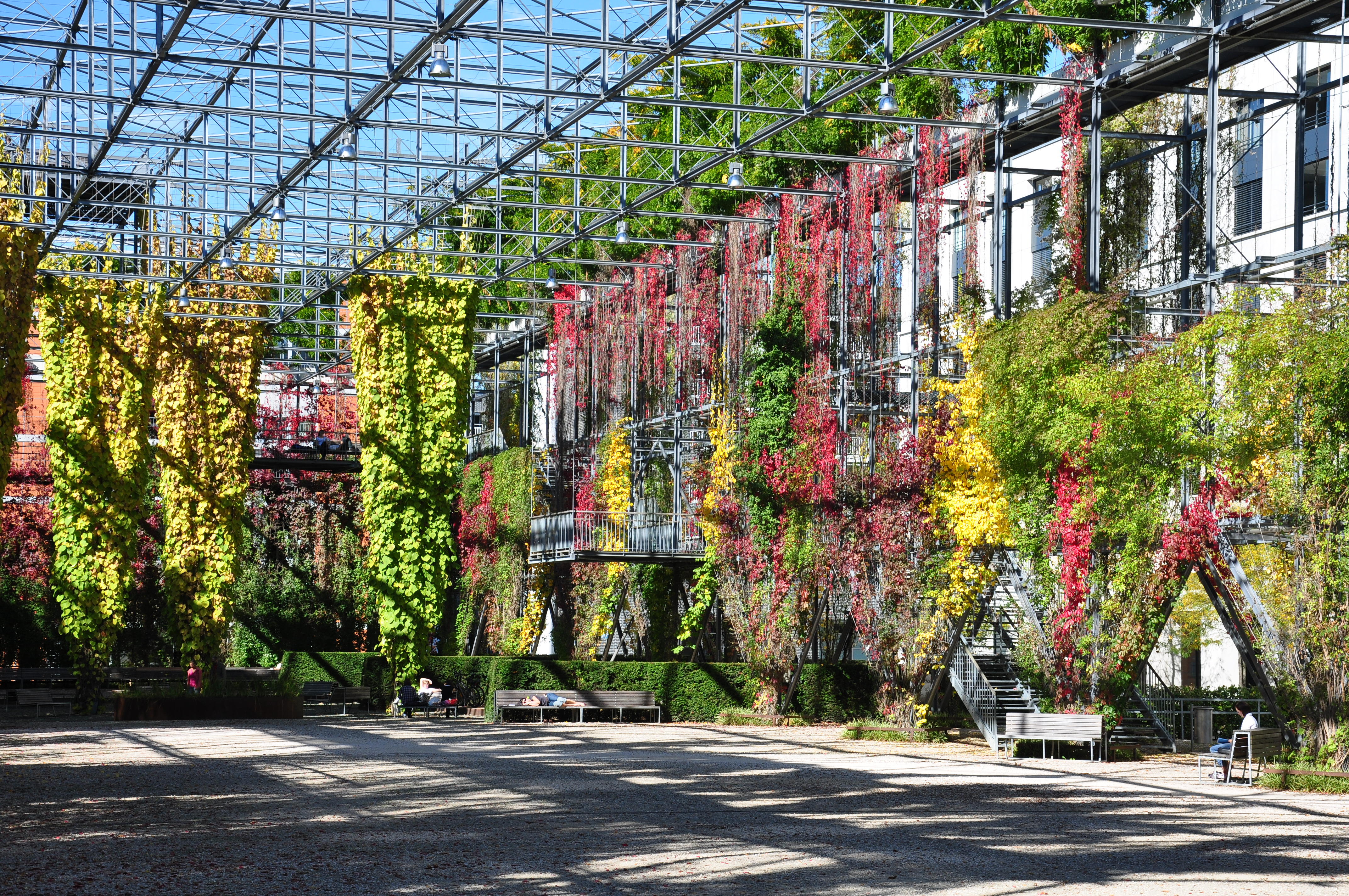 MFO-Park in Zürich-Oerlkon (Switzerland)